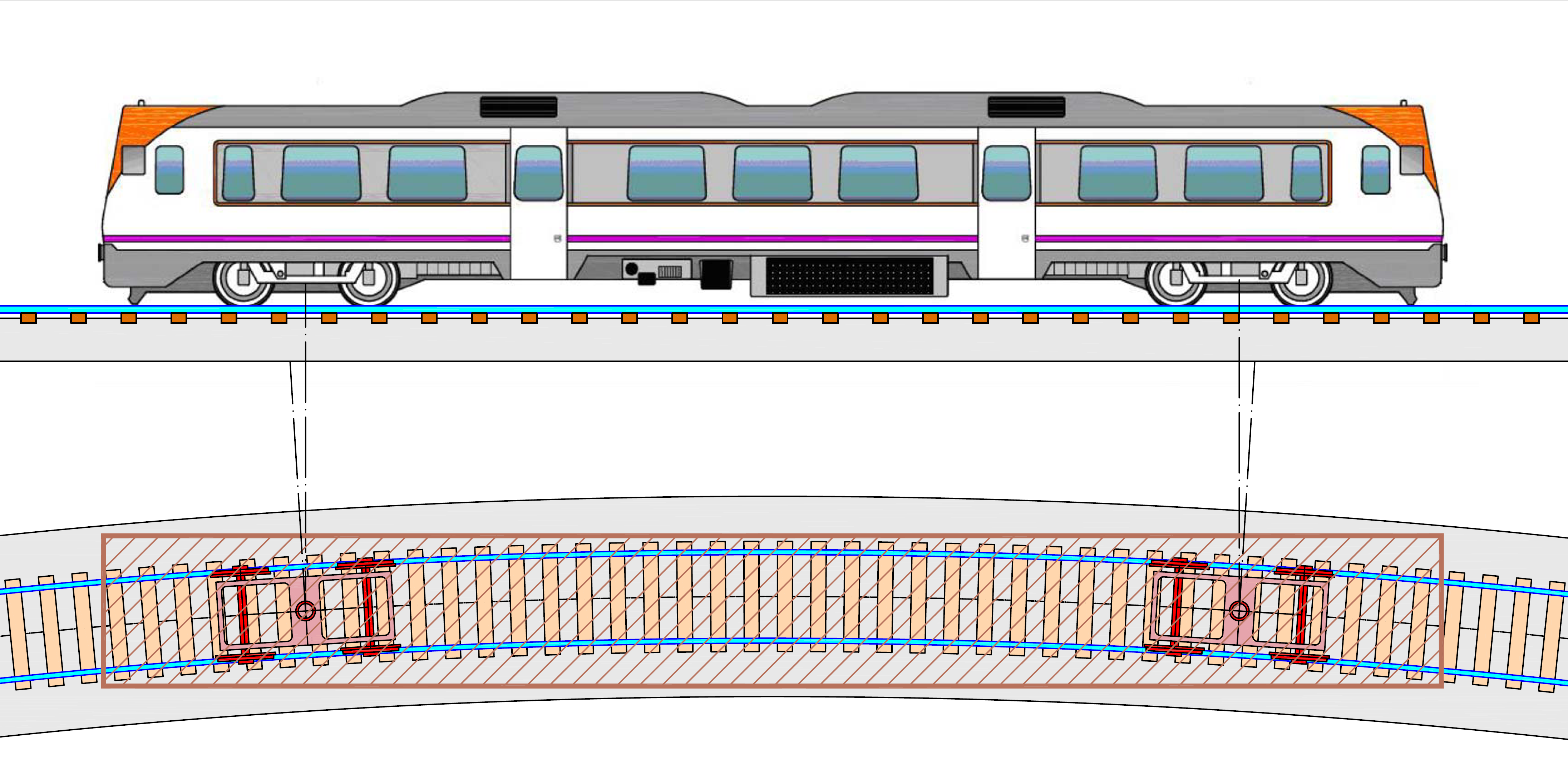 Funcionamiento de los bojes de un automotor en una curva de radio 150 m. La distancia entre los ejes de cada boje es de 2,50 m, y la batalla entre pivotes de bojes es de 18,6 m